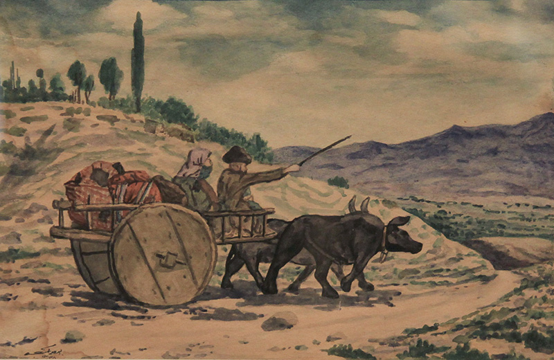 Qaçqınlar